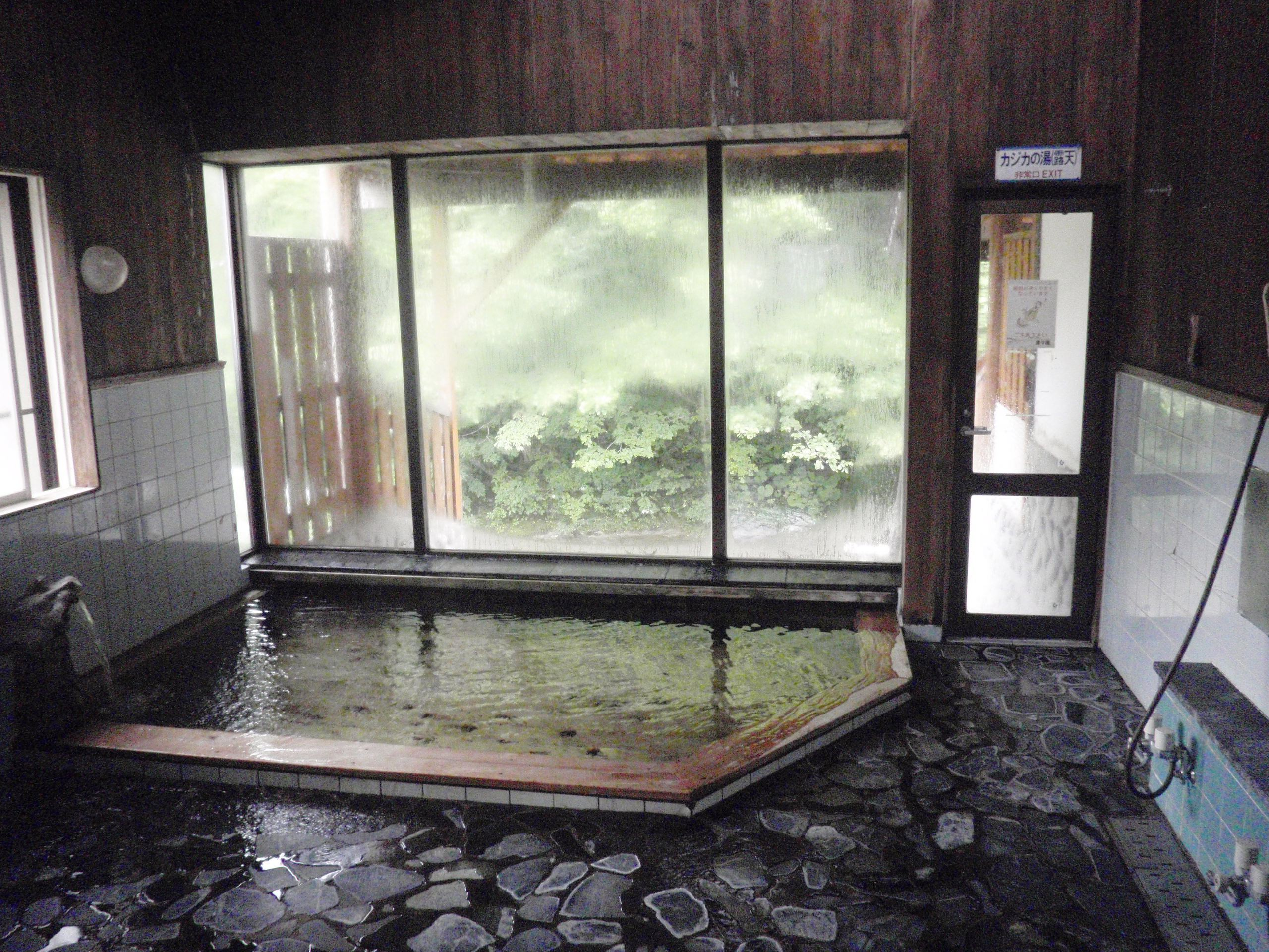 湯野川温泉、濃々園内風呂。